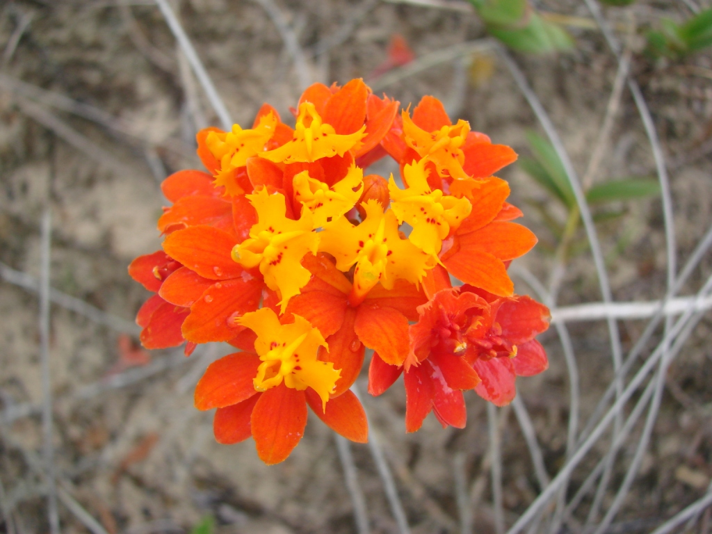 Epidendrum fulgens - ORCHIDACEAE Imbituba - SC - Brasil